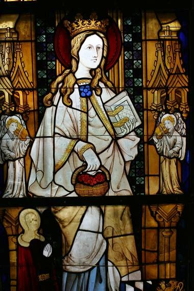 Detail aus dem Westfenster des Altenberger Domes (hl. Elisabeth und Stifterin Anna von der Pfalz, ursprünglich Verkündigungsszene deshalb Elisabet, siehe Uwe Gast, Daniel Parello, Hartmut Scholz: Der Altenberger Dom (Monumente der Glasmalerei 2), Schnell & Steiner, Regensburg 2008, S. 51ff, ISBN 978-3-7954-1960-8